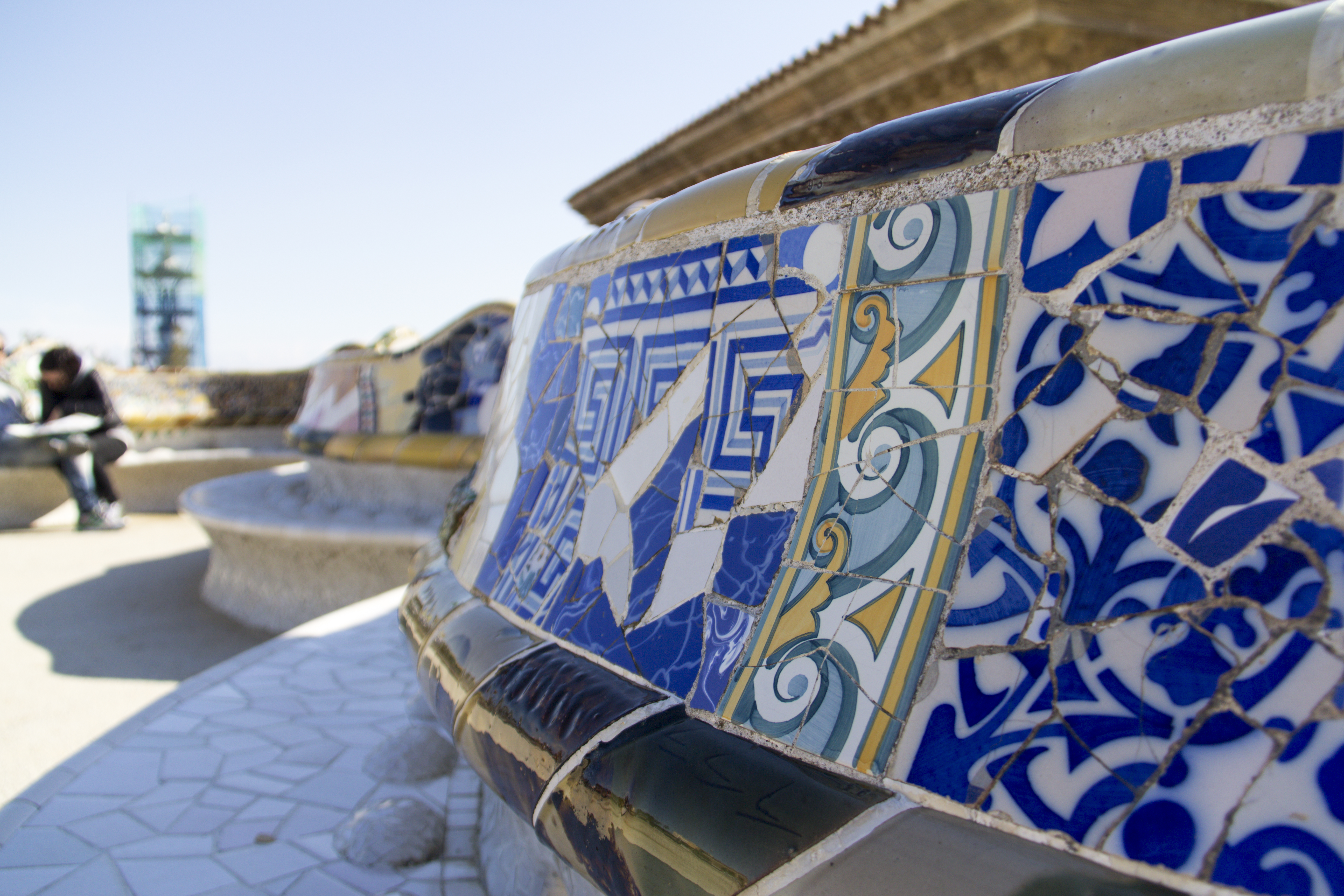 La Salut, Barcelona, Spain